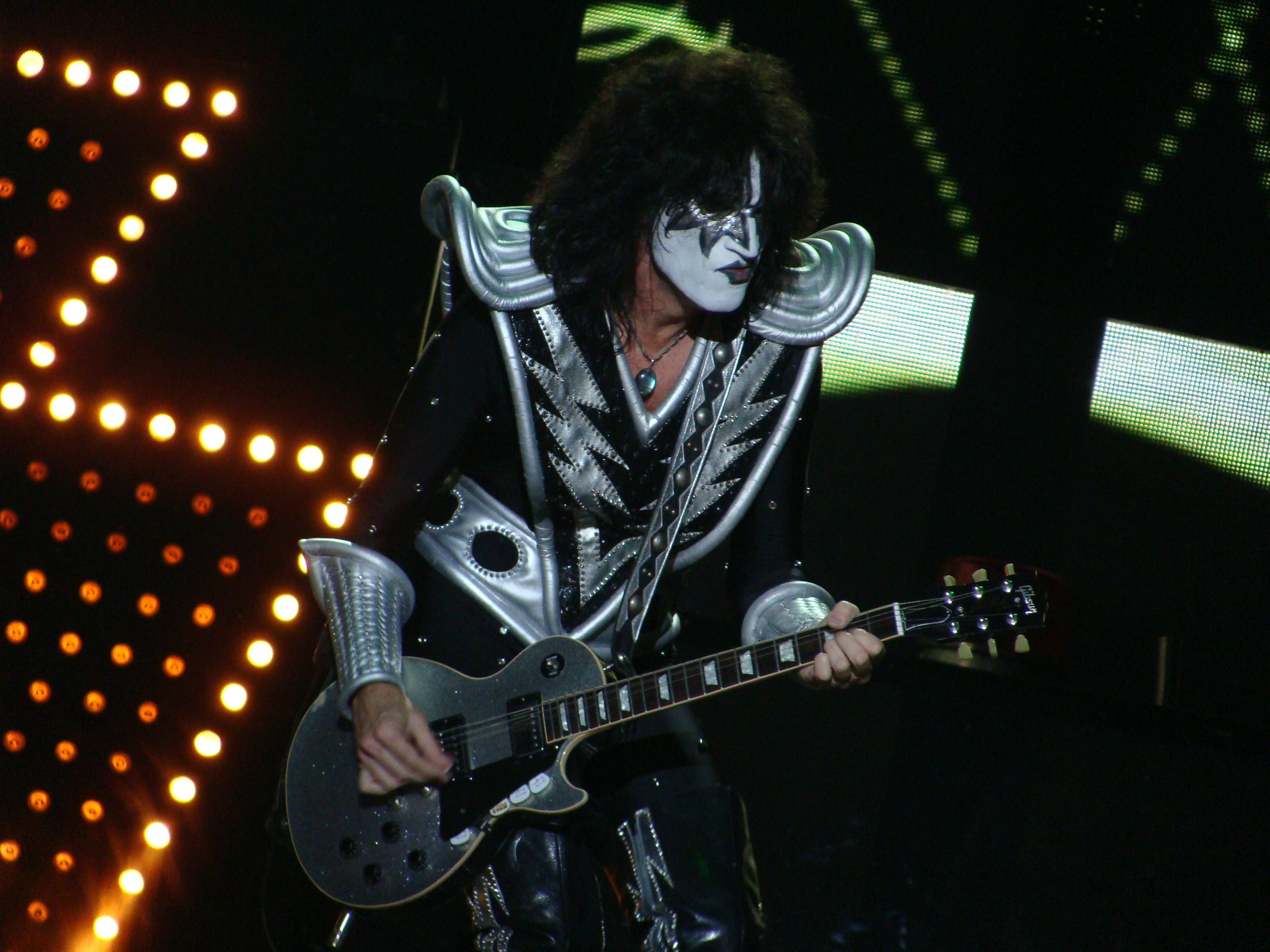 Tommy Thayer, en una actuación del grupo KISS en Vitoria-Gasteiz, en el Azkena Rock Festival.